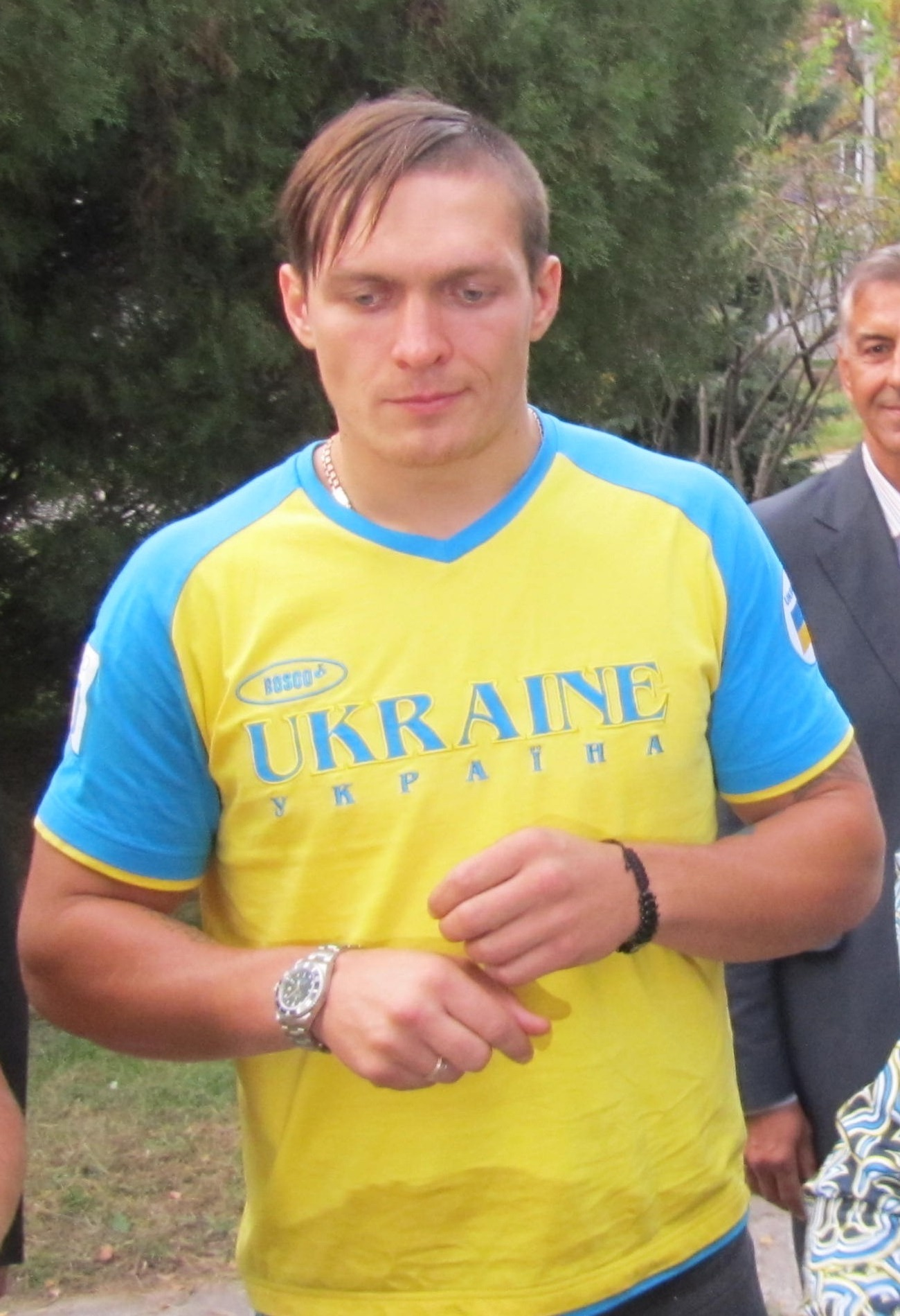 Усик Олександр Олександрович (Кременчук, 4.10.2012)